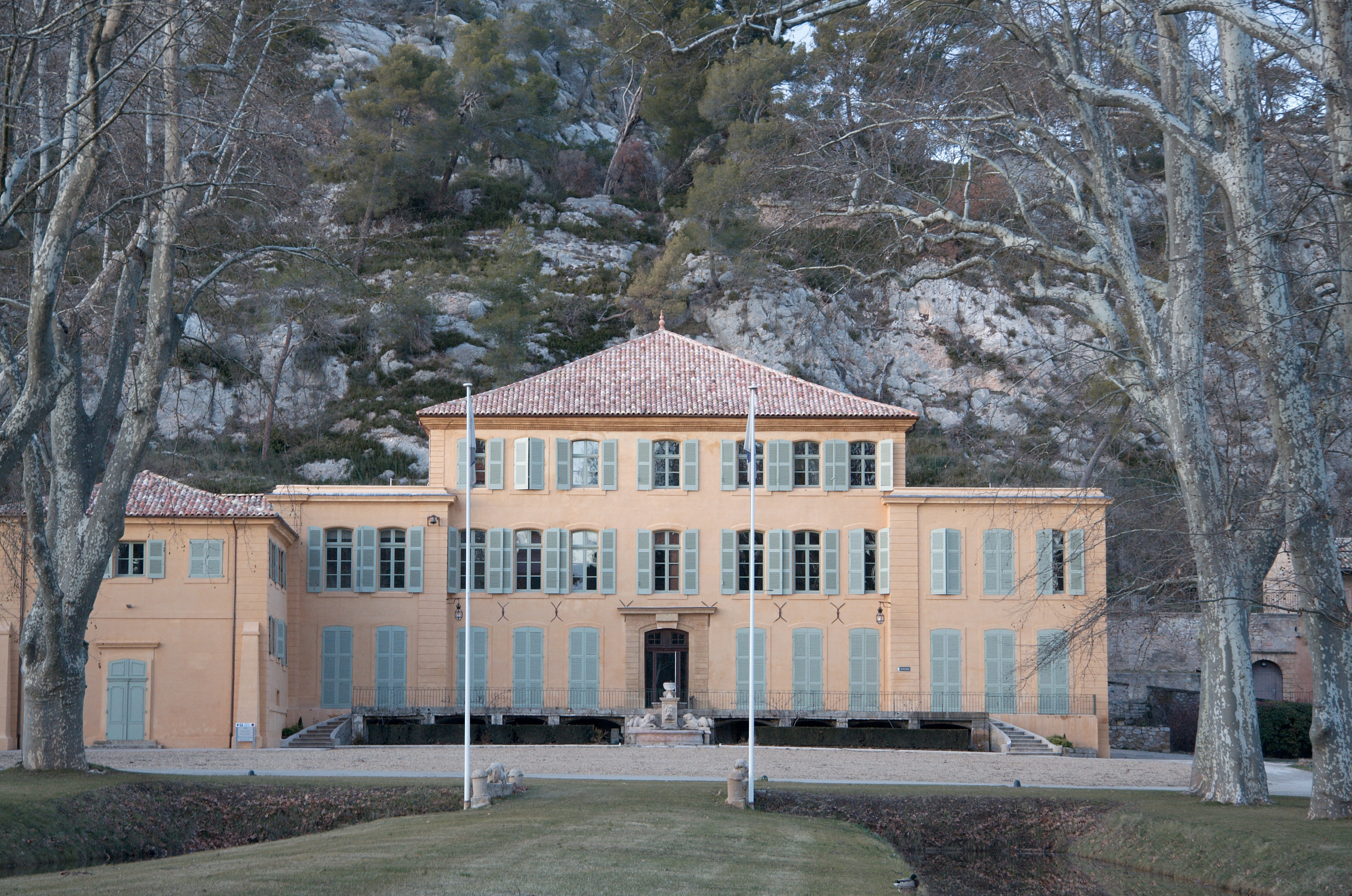 Société du Canal de Provence, Le Tholonet, France.